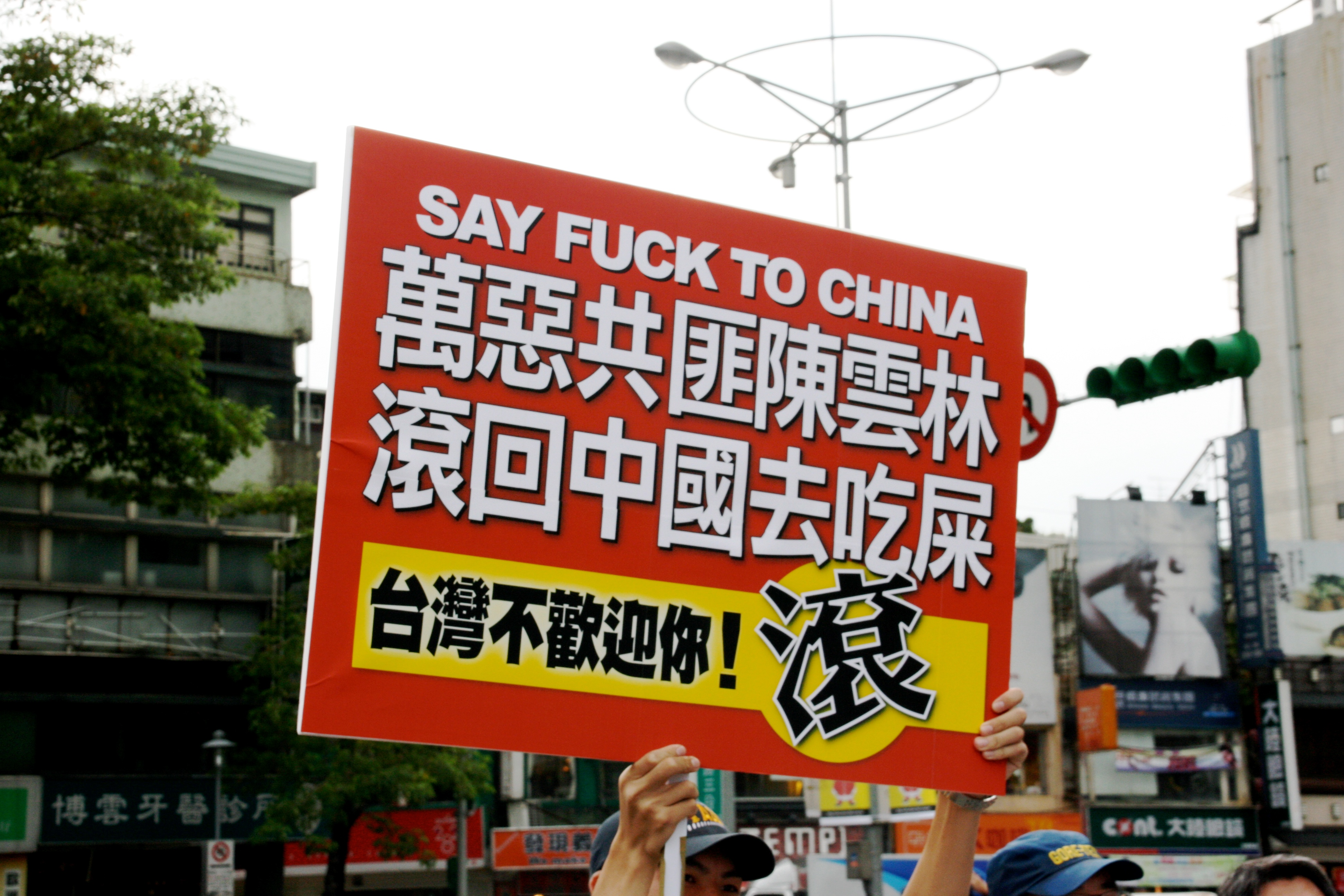 1025反黑心顧台灣大遊行台大線，台灣獨立運動支持者高舉標語牌批評陳雲林「萬惡共匪」，要求陳雲林「滾回中國去吃屎」。2007年11月11日，台獨左派人士黃泰山批評，2000年政黨輪替至今已經近八年，政治人物仍在玩弄威權時期的「共匪陰謀」伎倆，叫人嘆息。（黃泰山 (2007-11-11). 向弱勢靠攏 台聯早該清黨了 (in zh-tw). 中國時報. Retrieved on 2016-09-11.）